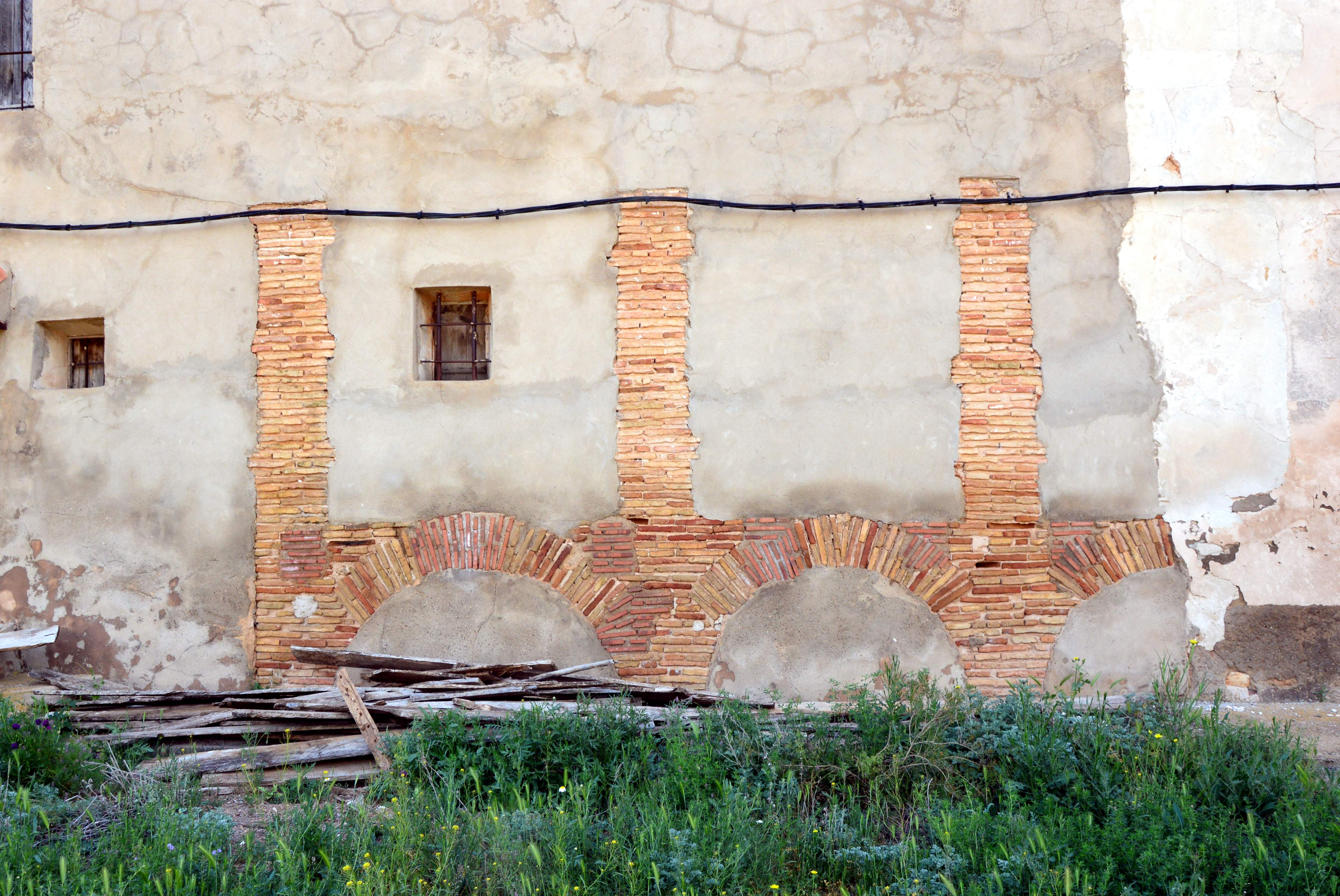 Detalle de antiguas estructuras de ladrillo en la Masía de la Torre en Villastar (Teruel), 2017.